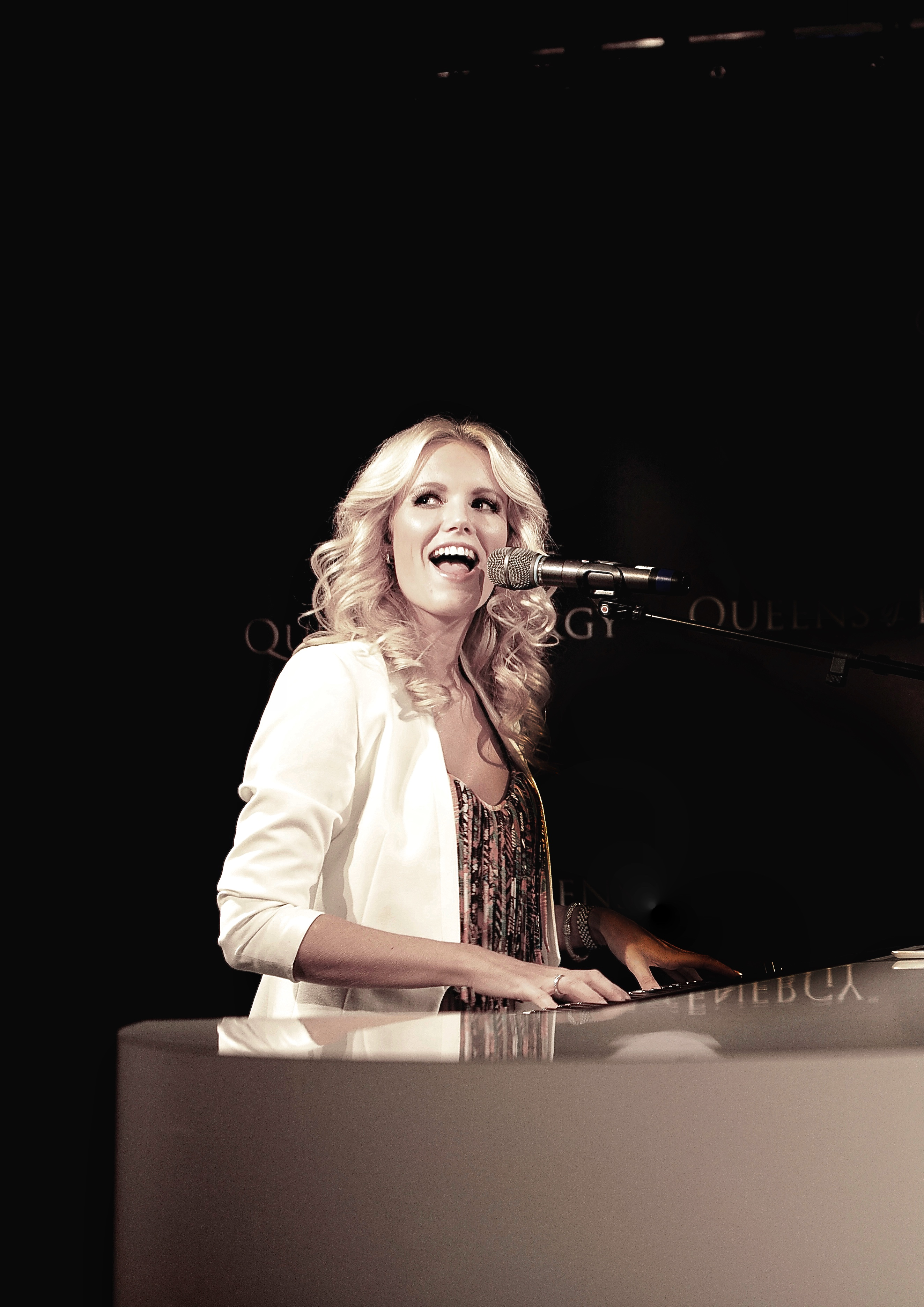 live Maaike Jansen